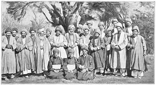 "De leden der zoroastrische gemeente te Kirman"